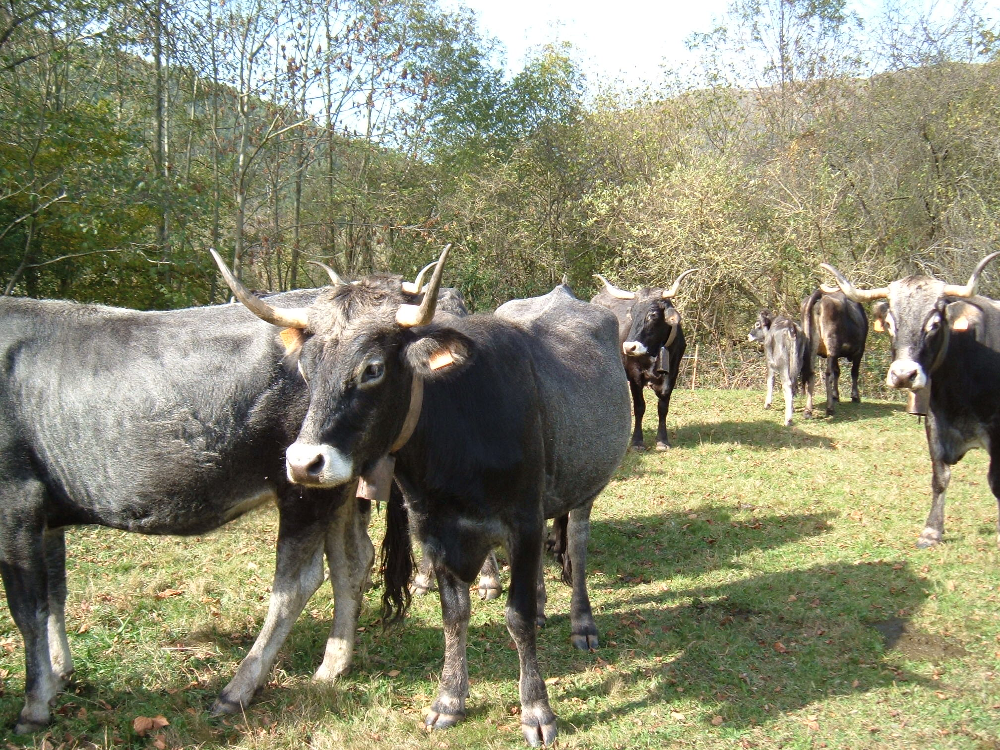 Ganado de raza Tudanca en la feria de Ruente, Cantabria.